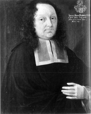 Portrait: Kurrer, Johann Adam (1641-1692) Funktion: Professor, Jura Künstler: Anonym Datierung: 1684 Bezeichnung: „IOHAN ADAM KVRRER. V.I.D. / et Instit: Justin: Prof: publ: / pictus anno Christi 1684 / AETA: 43“ (o.r.) „J.A. Kurrer / Jur. F. pict. 1684“ (Rahmenschild) Literatur: Scholl Nr. 114 Inventar: 97/147 Material: Öl auf Leinwand Bild: 62 cm x 49,5 cm Rahmen: 74,3 cm x 62 cm